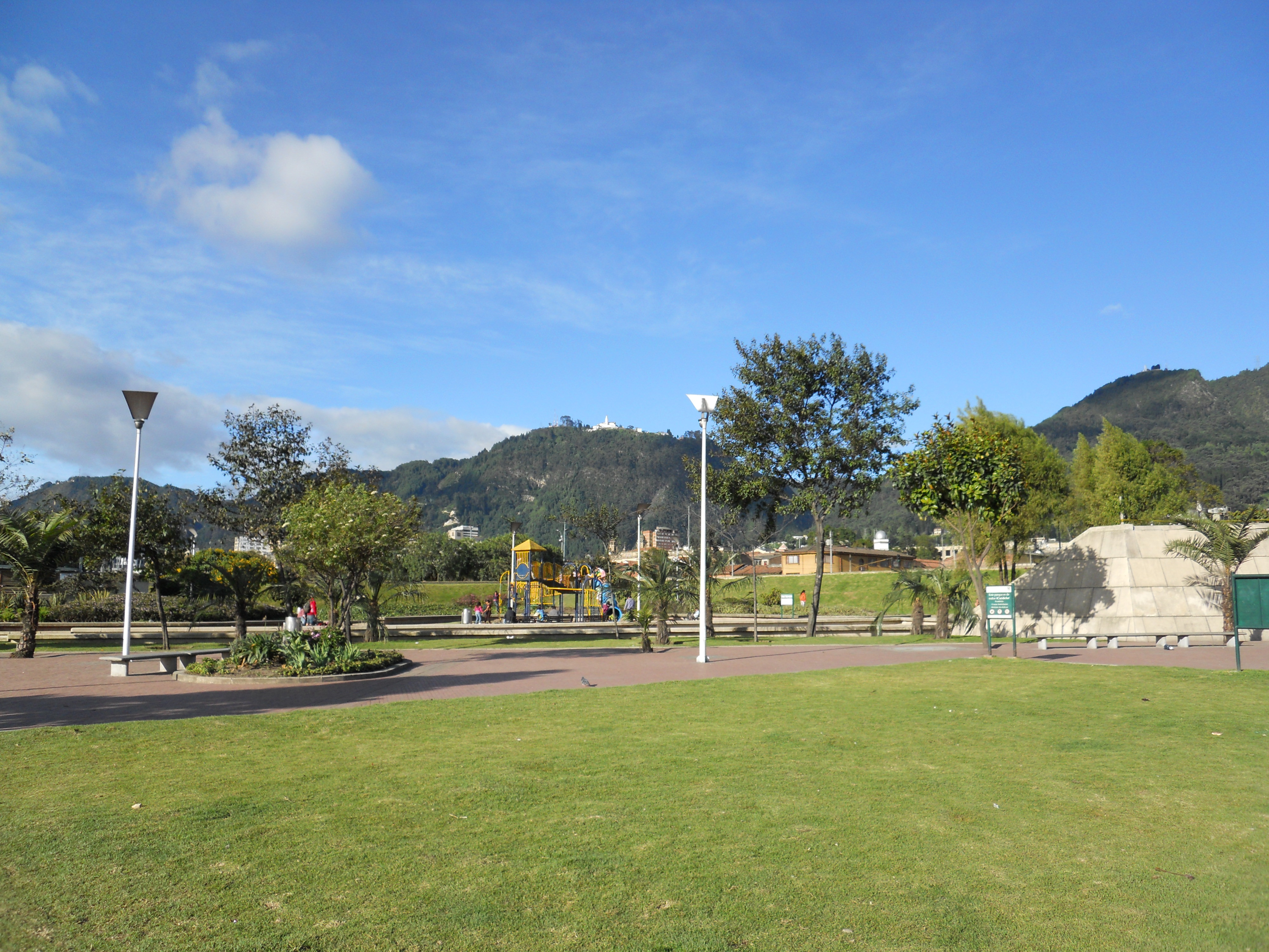 Monserrate desde el Parque Tercer Milenio.